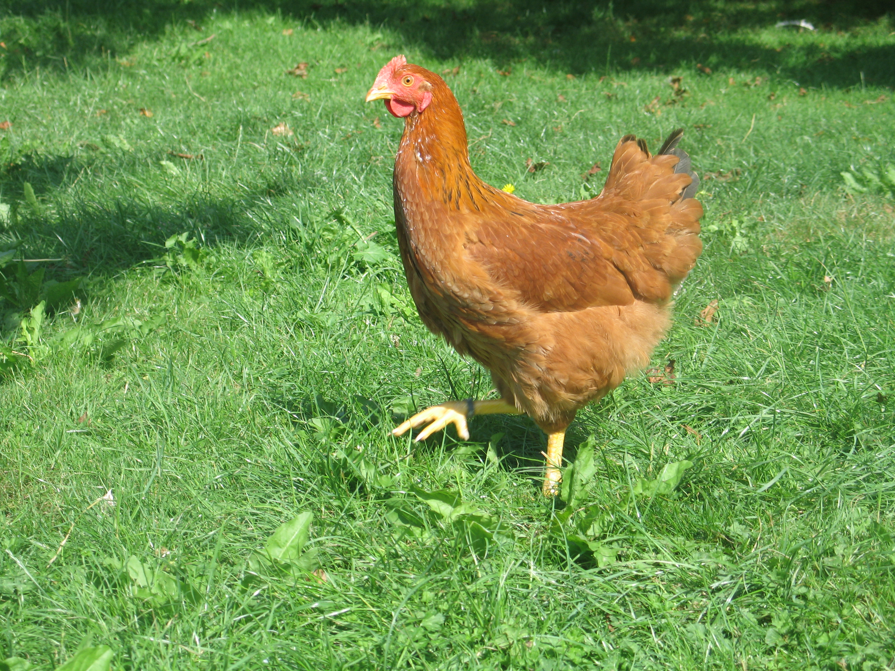 Euskal Oiloa. Barietate gorriko oiloa